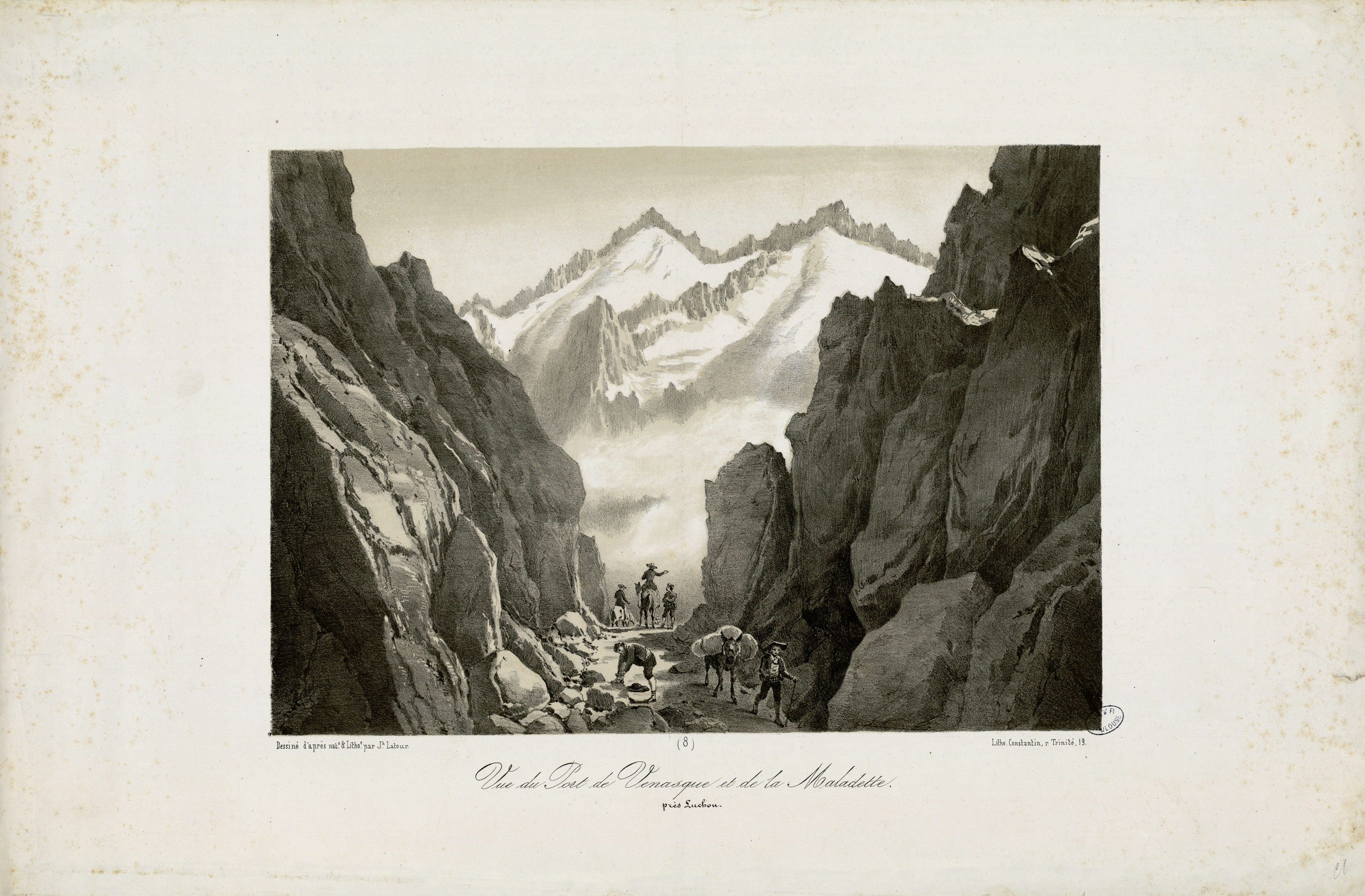 Fait partie d'un recueil de 17 lithographies en camaïeu et 1 pl. en couleurs. Pl. 1 à 12 dessinées et lithographiées par Latour, pl. 13 à 18 dessinées et lithographiées par Eugène Fil. Ancely, René (1876 - 1966). Possesseur